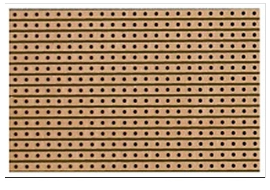 Veroboard sample